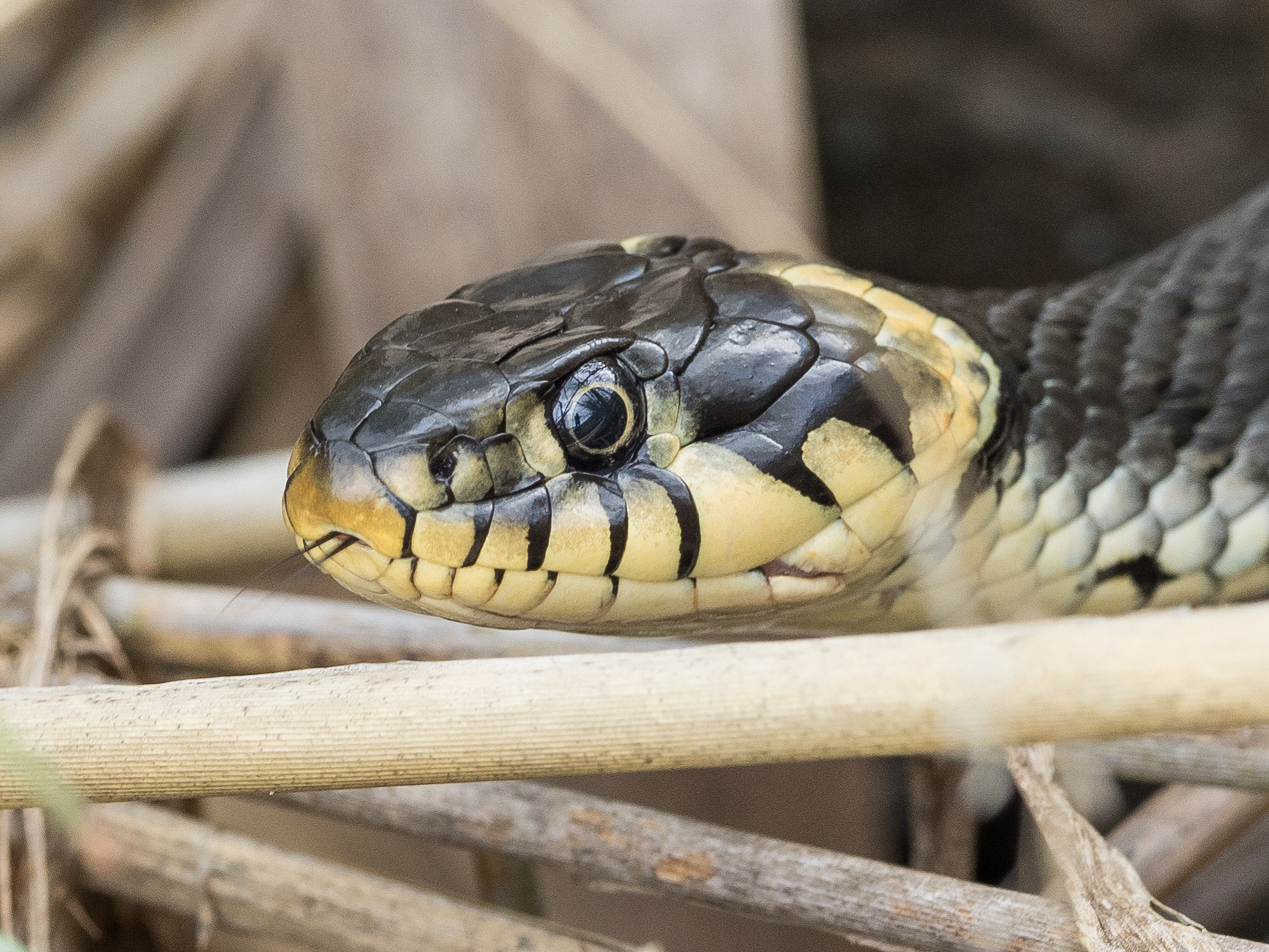 Snok, Grass snake, Natrix natrix, Vaxholm Stockholm Sweden June 2016